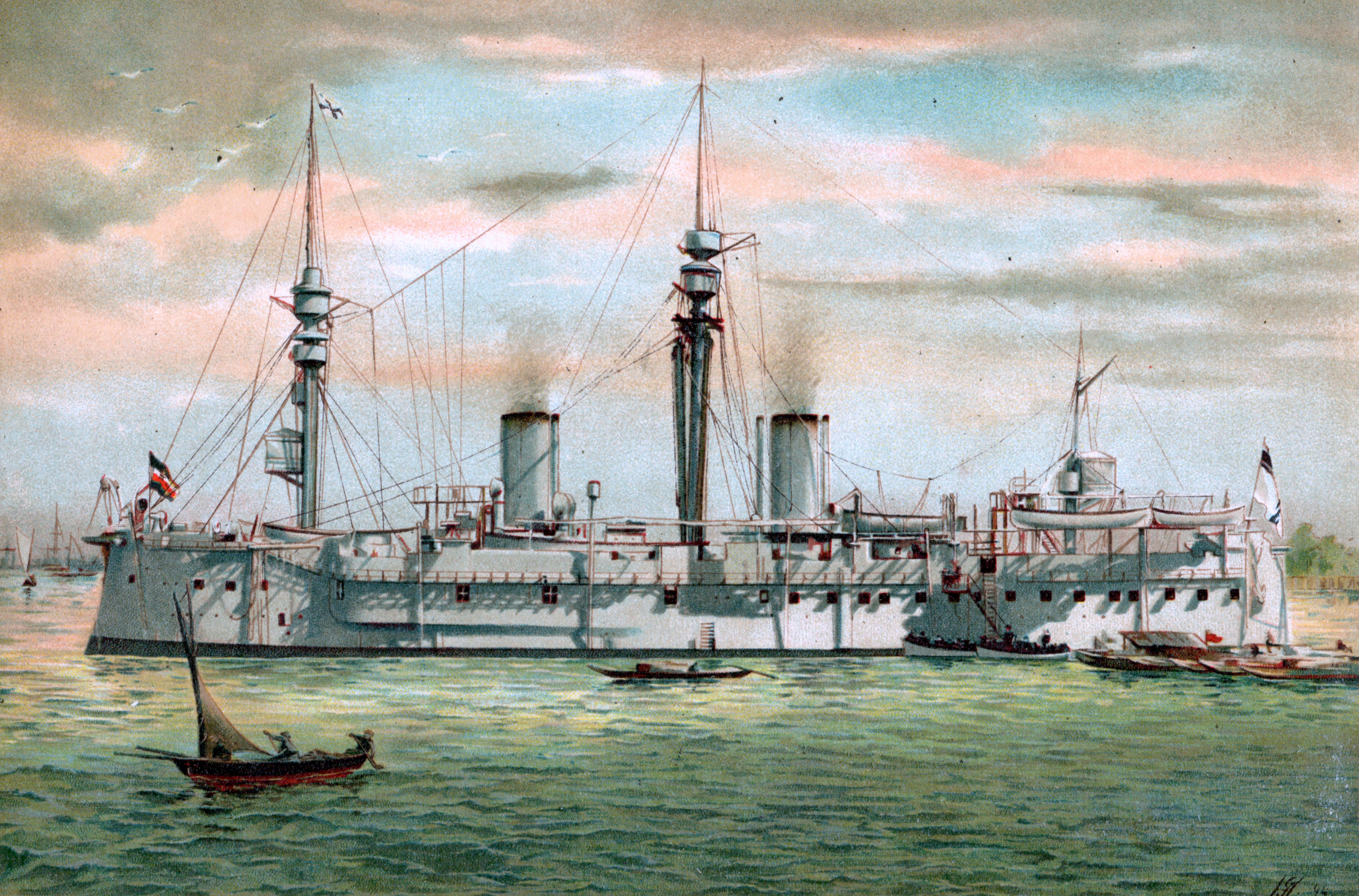 S.M. Hafenschiff Uranus